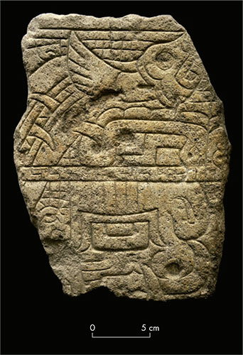 Foto tomada por el arqueólogo Jorge Antonio Gamboa Velásquez